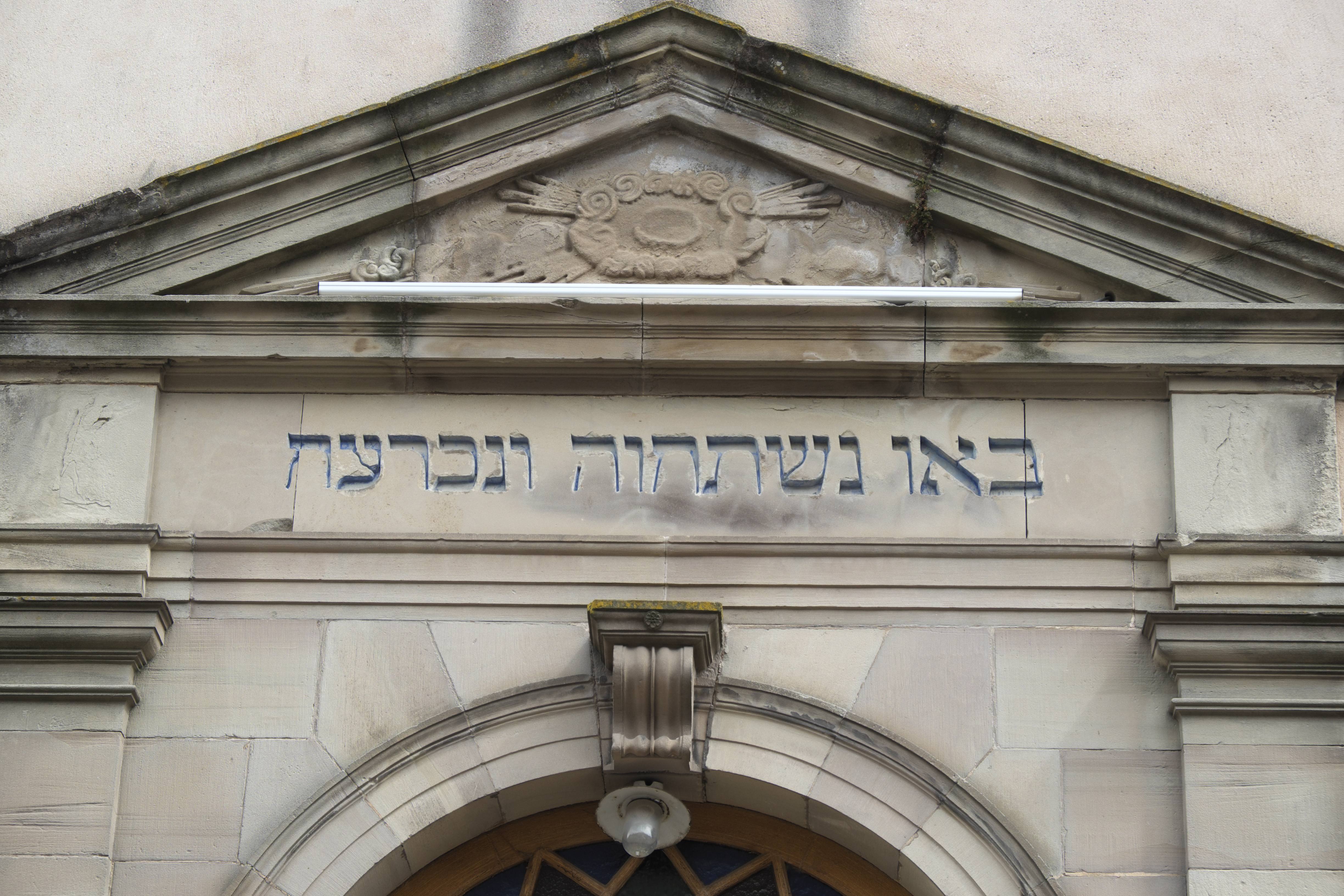 Synagoge in Phalsbourg im Département Moselle (Lothringen/Frankreich), hebräische Inschrift über dem Eingang